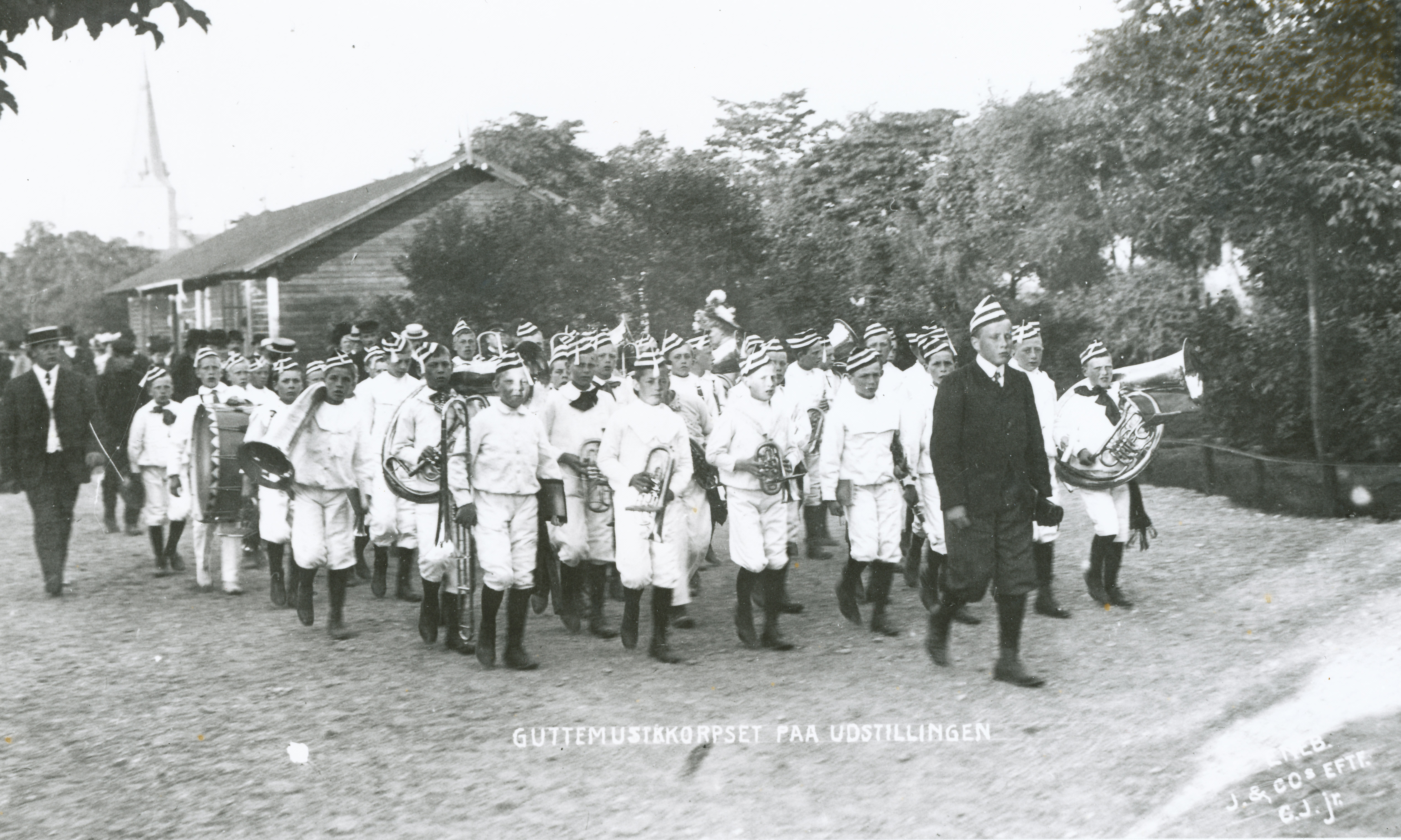 Trøndelagsutstillingen 1930. Guttemusikkorpset fra utstillingen. Fra et postkort; J. & co`s EFTF.